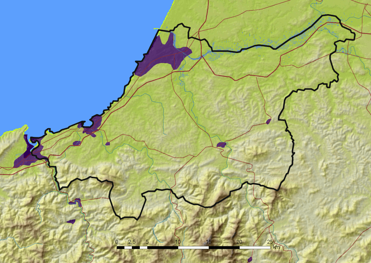 Lapurdiren mapa fisikoa